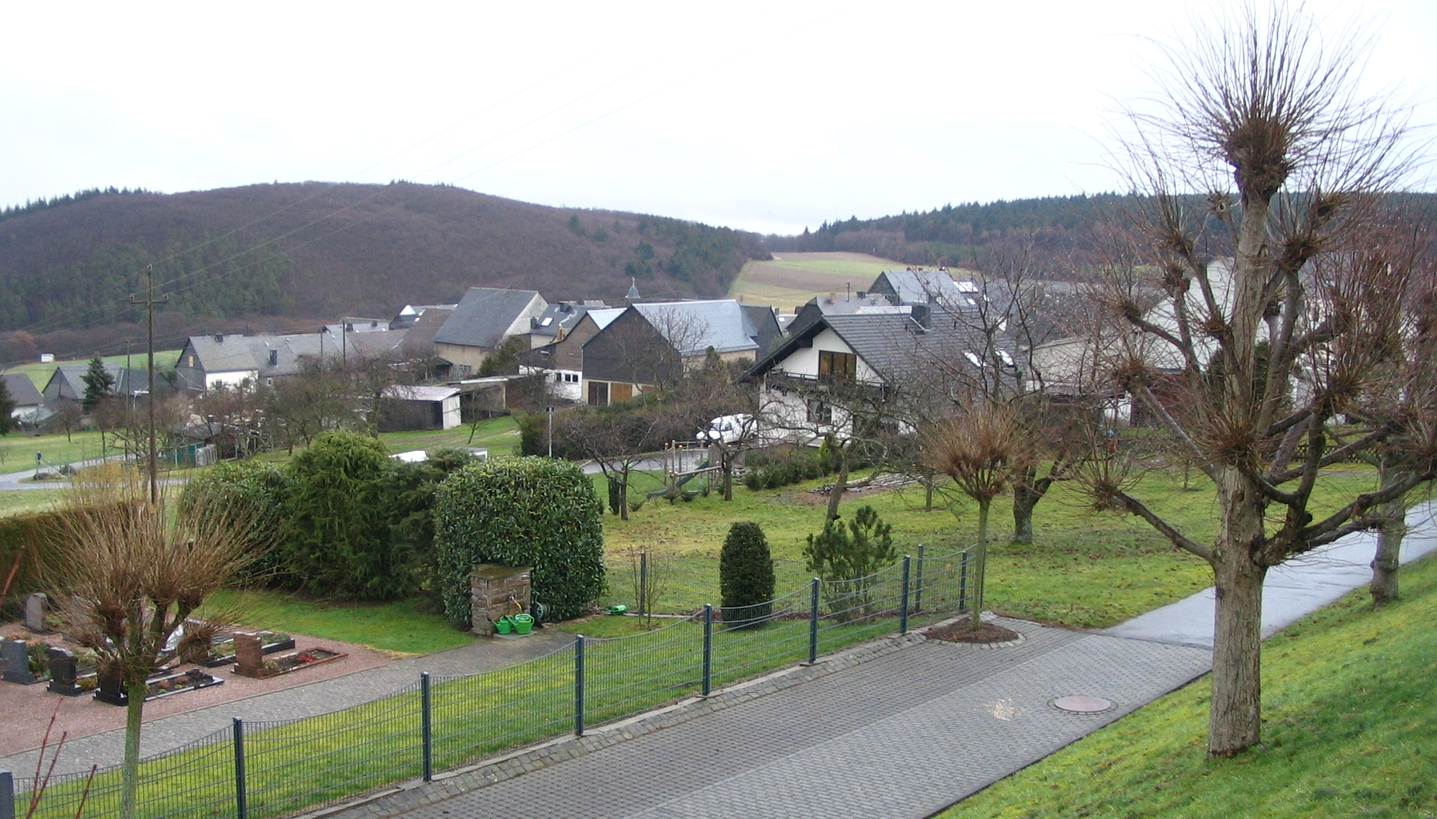 Utzenhain im östlichen Hunsrück